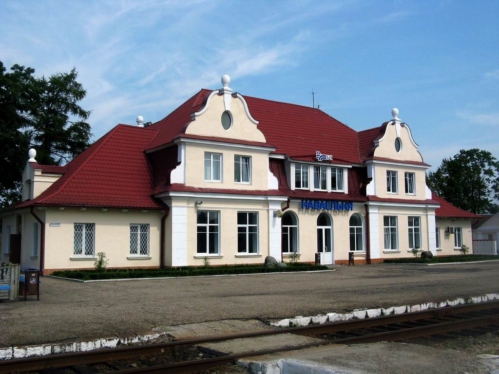 Беларуская (тарашкевіца): Наваельня